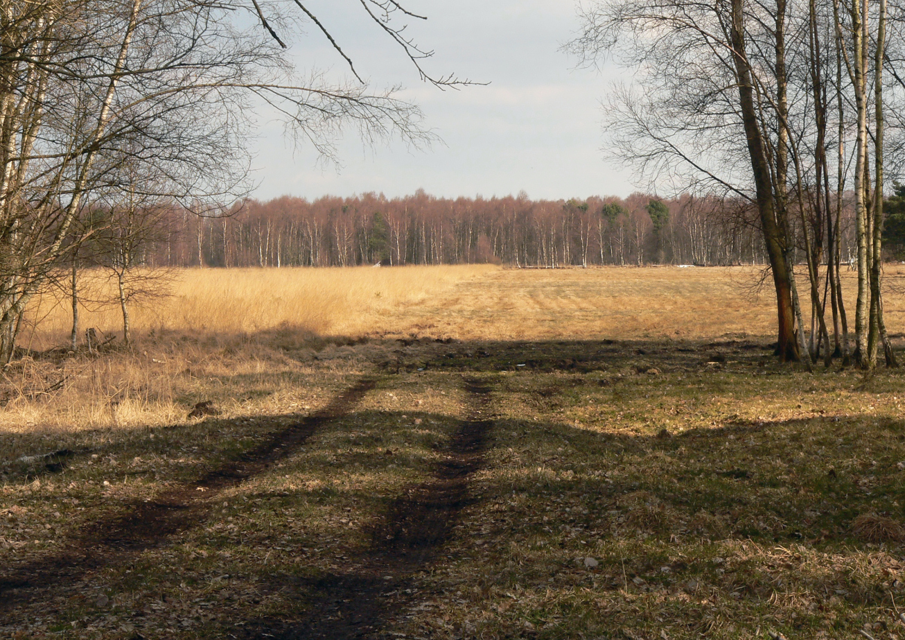 Grosses Moor bei Gifhorn